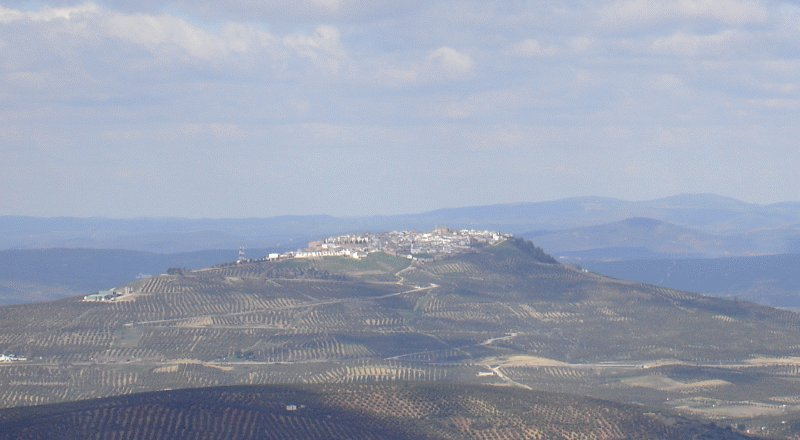 Iznatoraf visto desde la Sierra de las Villas